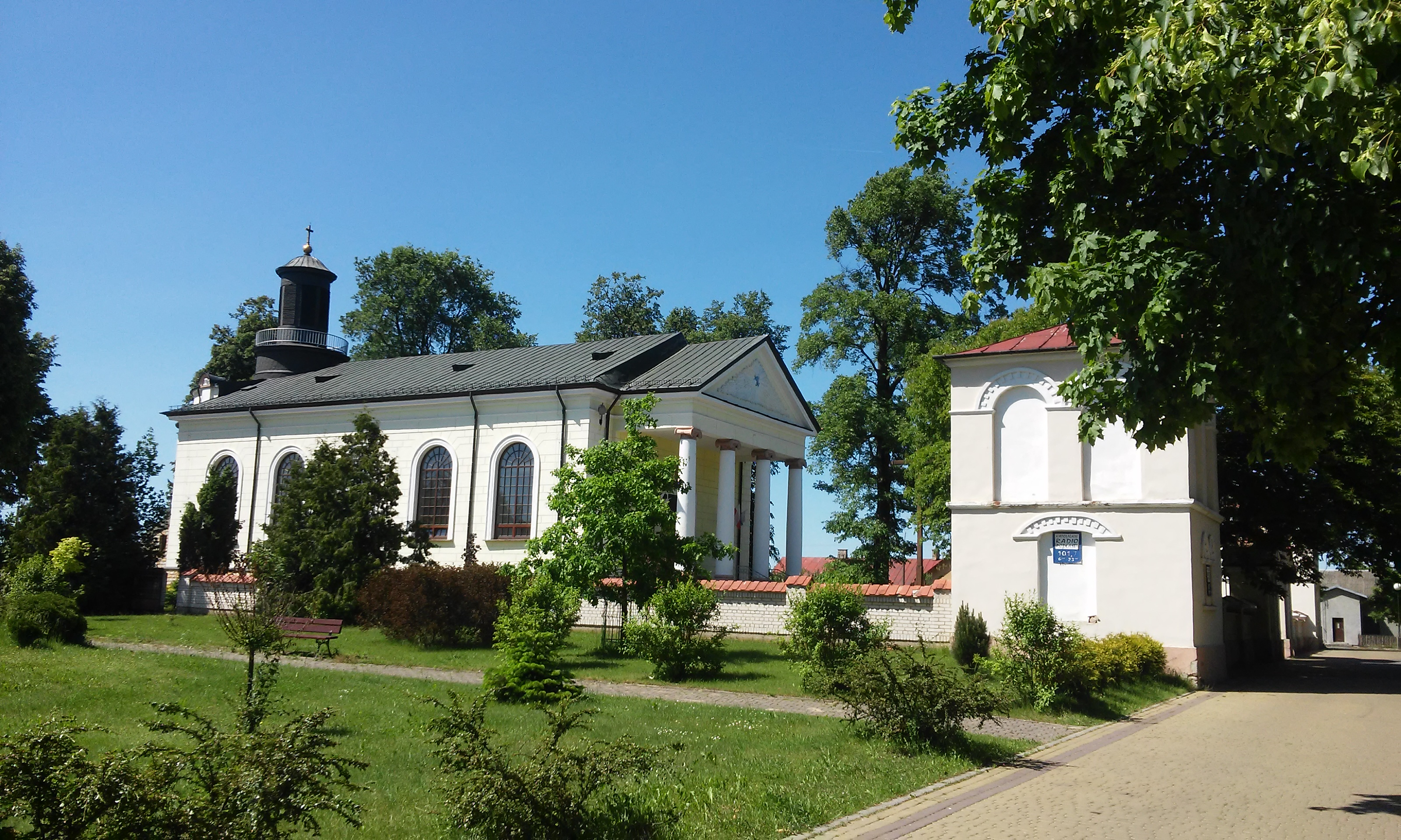 Jabłonna Lacka - rzymskokatolicki kościół parafialny pw. Wniebowzięcia NMP, 1824-1835, 2 poł. XIX